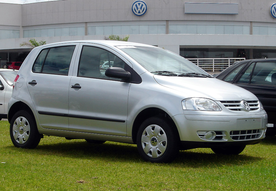 Volkswagen Fox